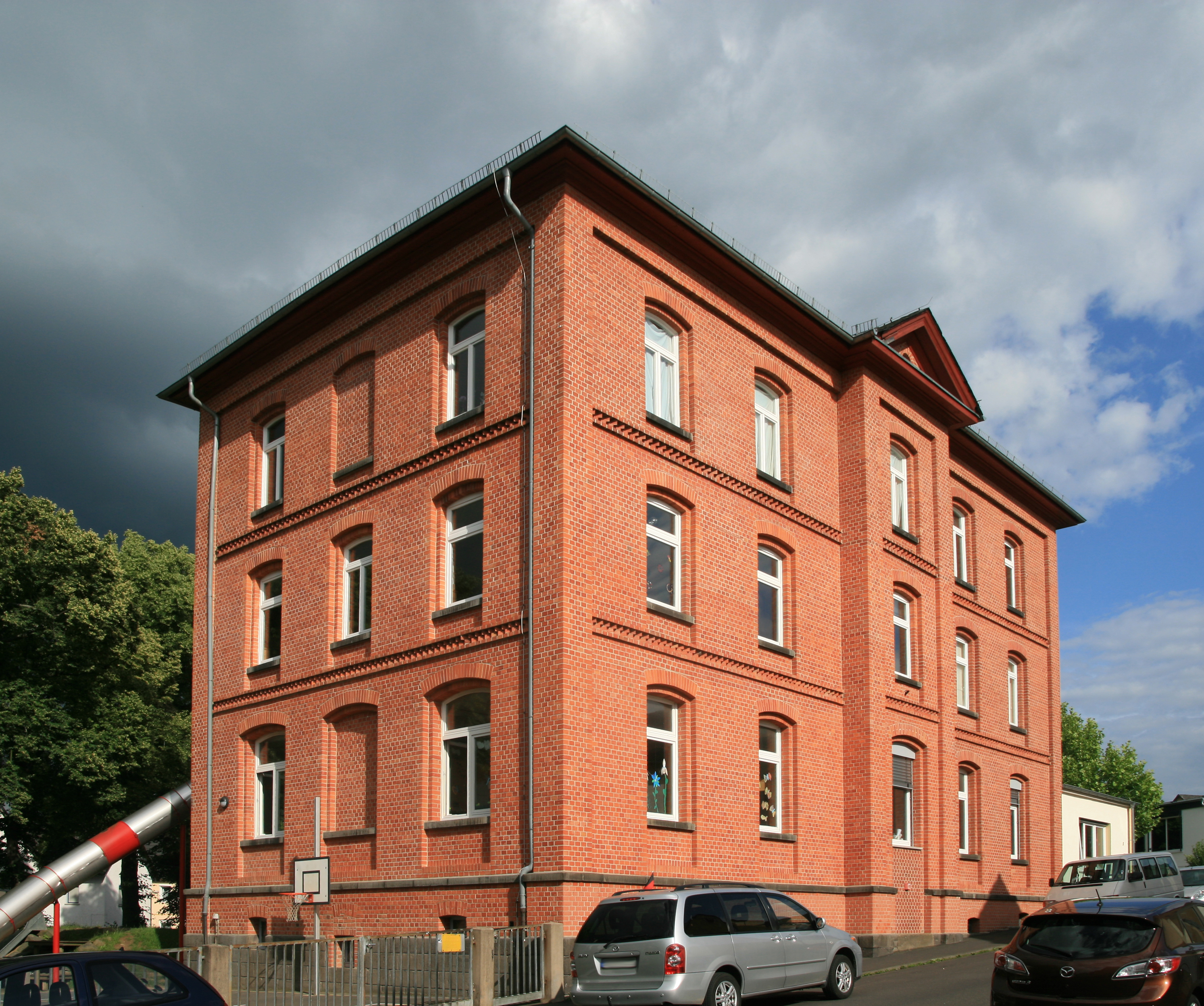 Gießen Kleinlinden An den Schulgärten 2 von Nordwesten